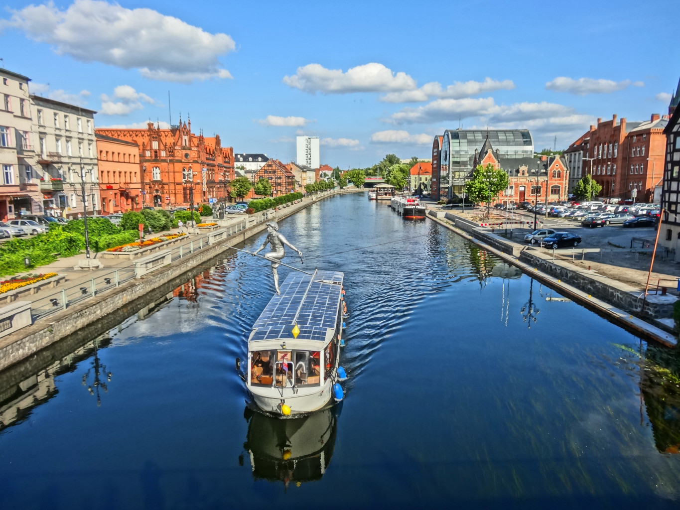 Widok z mostu Staromiejskiego im. Jerzego Sulimy-Kamińskiego w Bydgoszczy